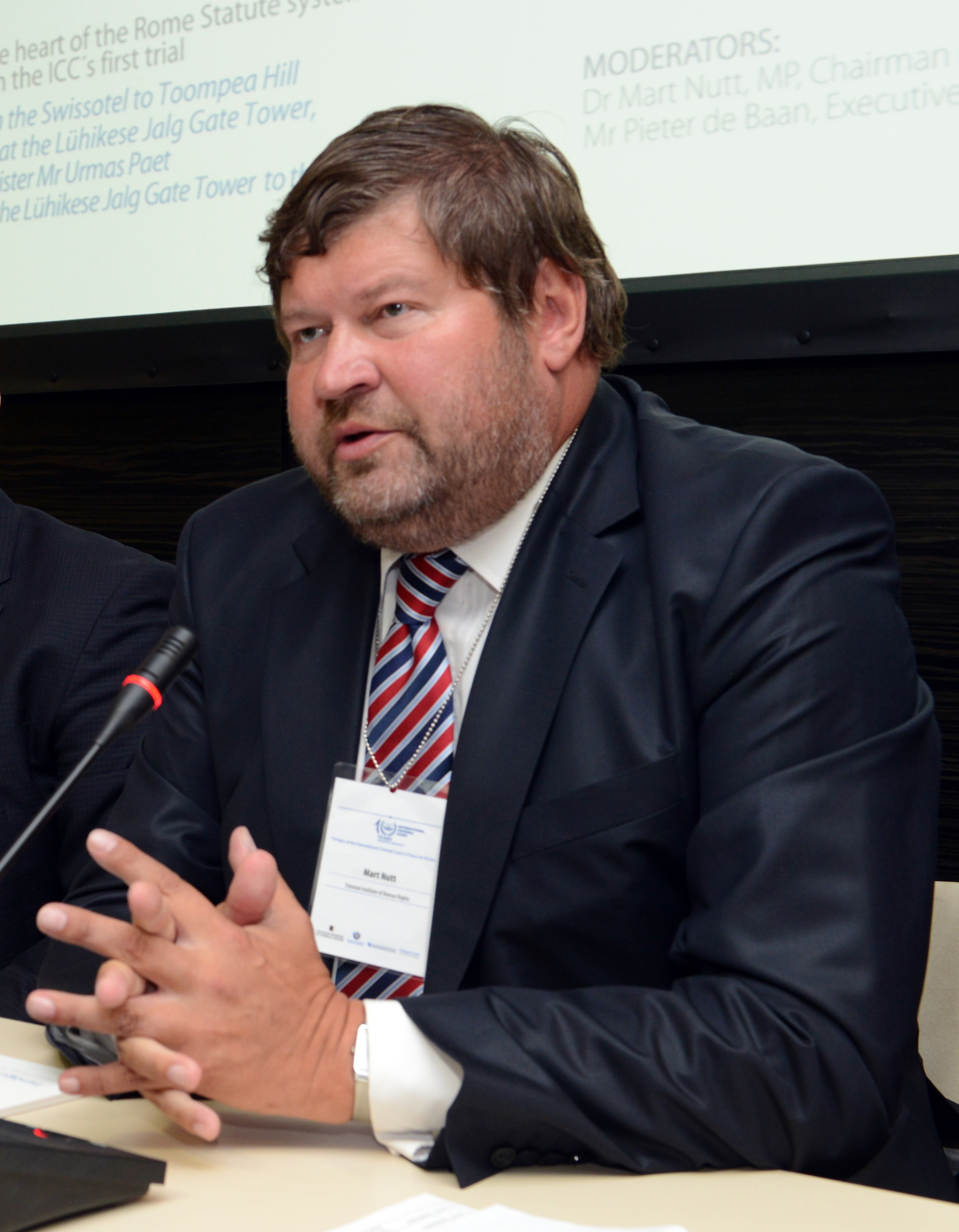 Mart Nutt Rahvusvahelise Kriminaalkohtu seminaril